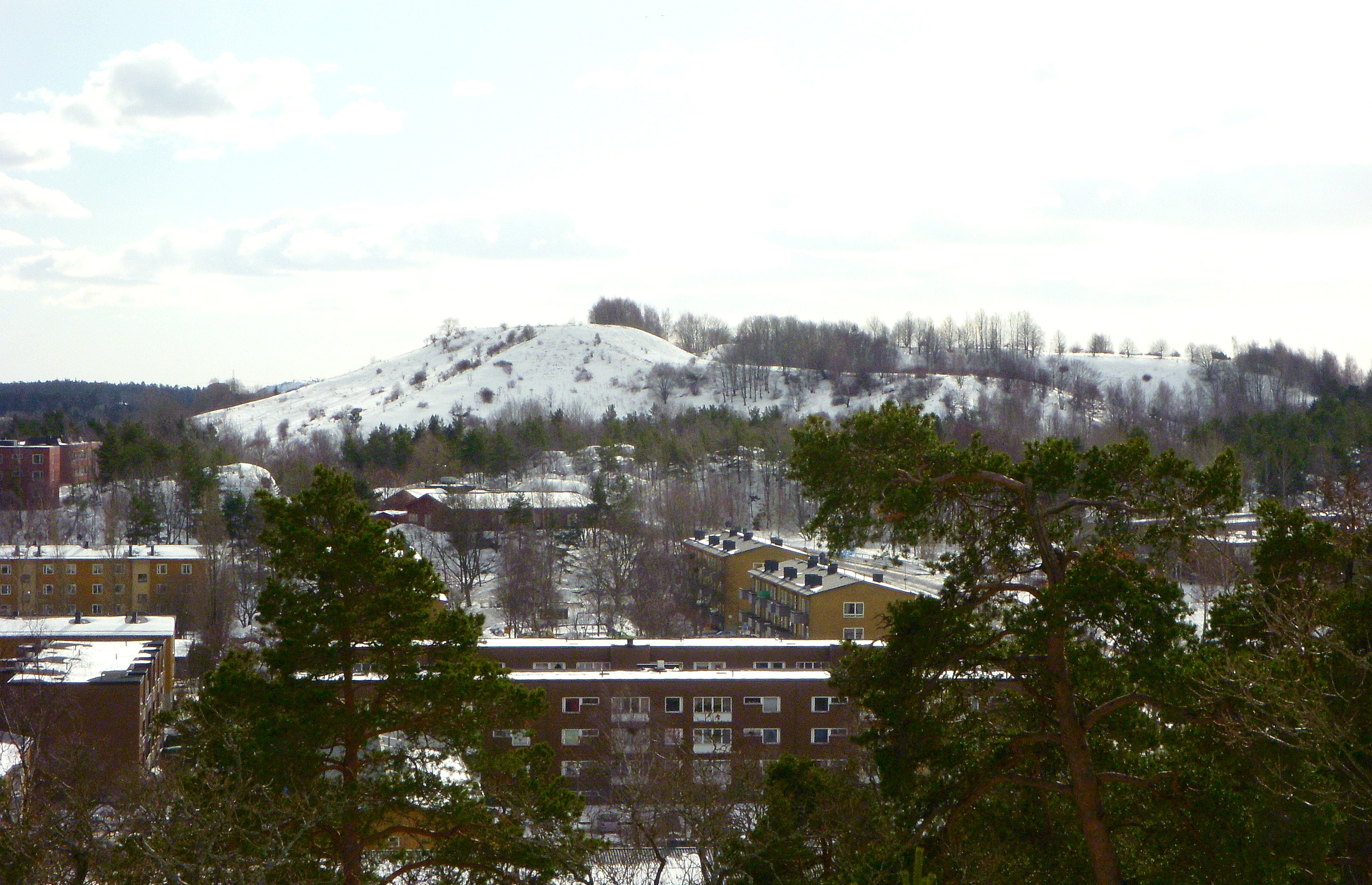 Vårbergstoppen vy från norr (Uddberget vid Vårbergsvägen/Våruddsringen)